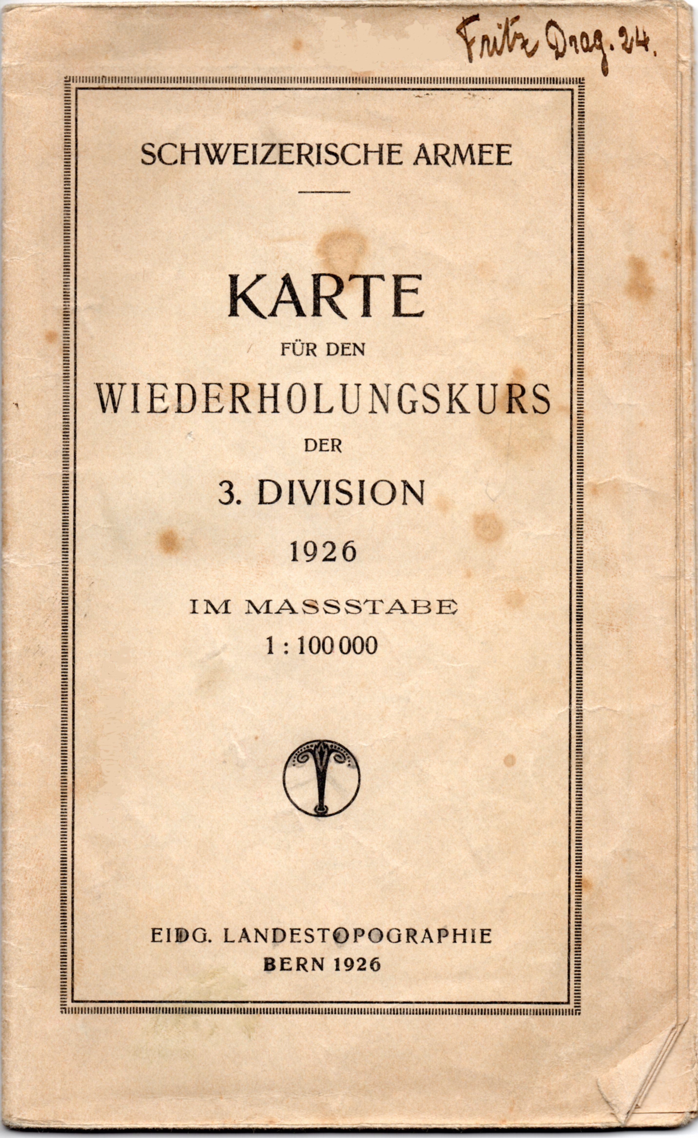 Karte Wiederholungskurs 1926 der 3. Division, Schweizer Armee